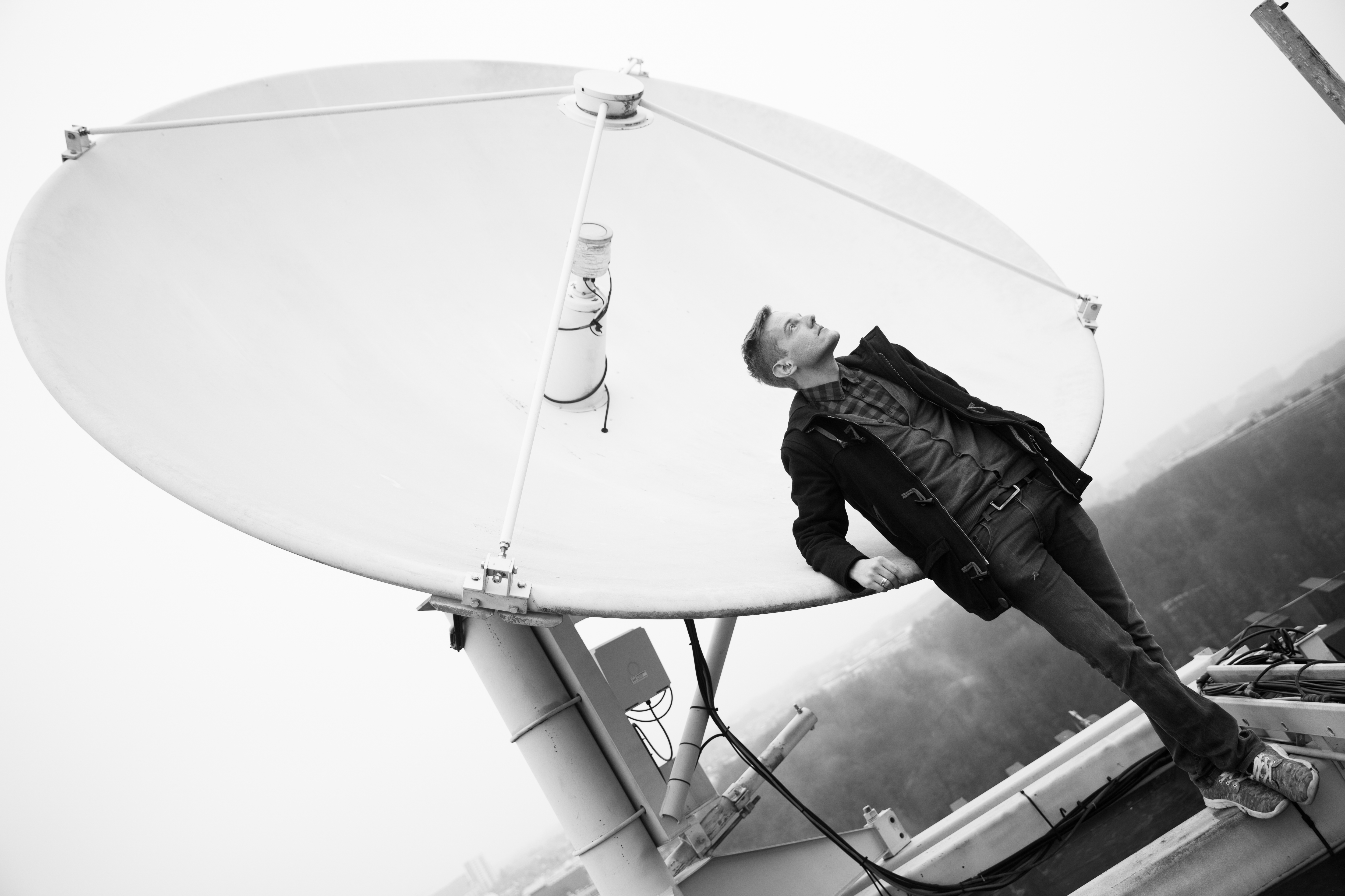 Tom De Cock op het dak van de VRT, Brussel